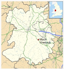 Mapo de Ŝropŝiro montranta la situon de la urbeto Much Wenlock, kreita per ekrankapto